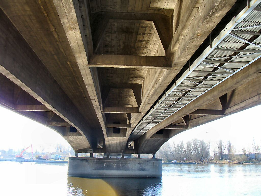 Most Cłowy w Szczecinie